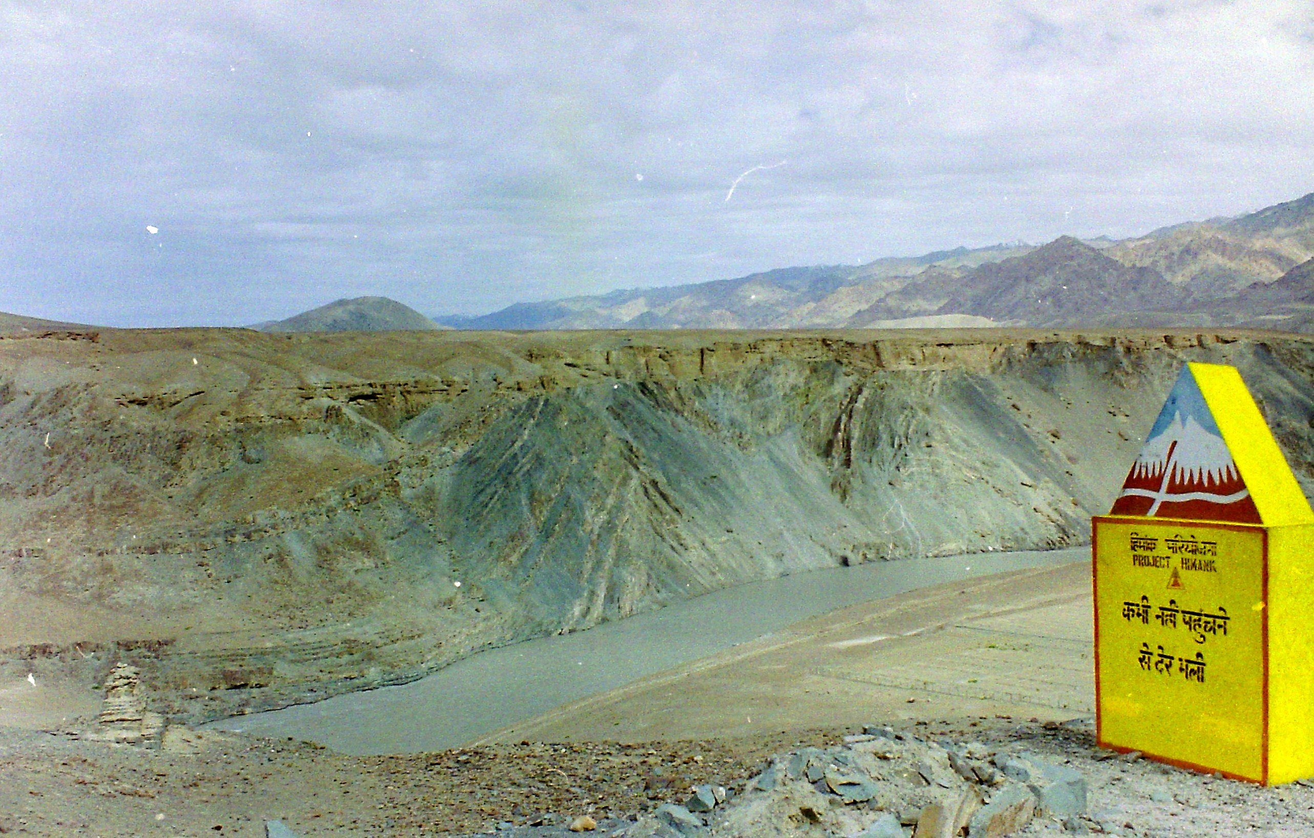 Sur la route du monastère Tak-Tok “Project l’Himank” panneau de la sécurité routière au Ladakh (scan d'une de mes photos prise lors d'un voyage au Ladakh en 1995)